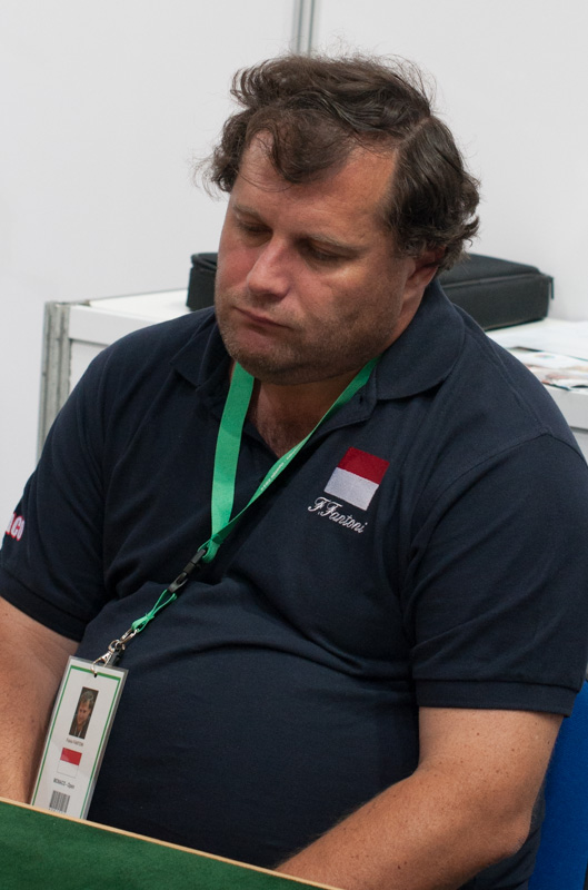 Monaco Fantoni Fulvio